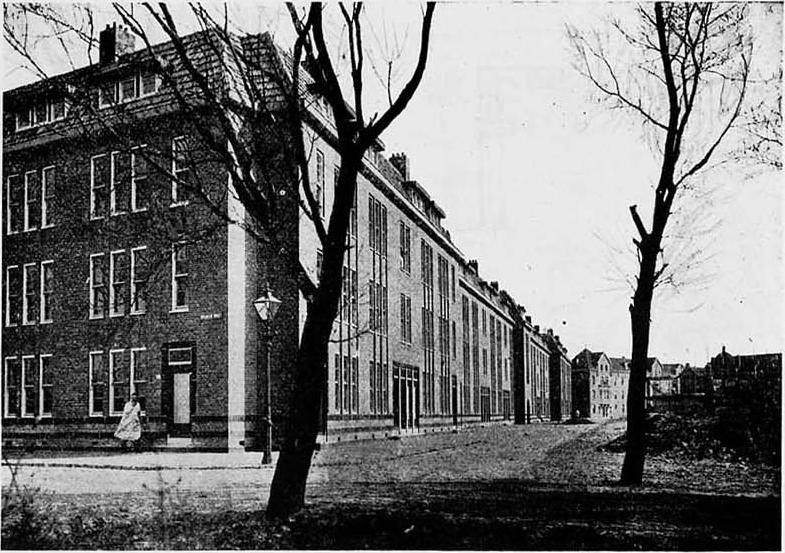 Woningblok V (Spaansebocht - Bilderdijkstraat - Van Lennepstraat - Potgieterstraat), Spangen, Rotterdam (gebouwd 1919 naar ontwerp architect J.J.P. Oud). Hoek Spaansebocht/Potgieterstraat. Foto afkomstig uit Bouwkundig Weekblad, 41e jaargang, nummer 37 (11 september 1920): p. 219.